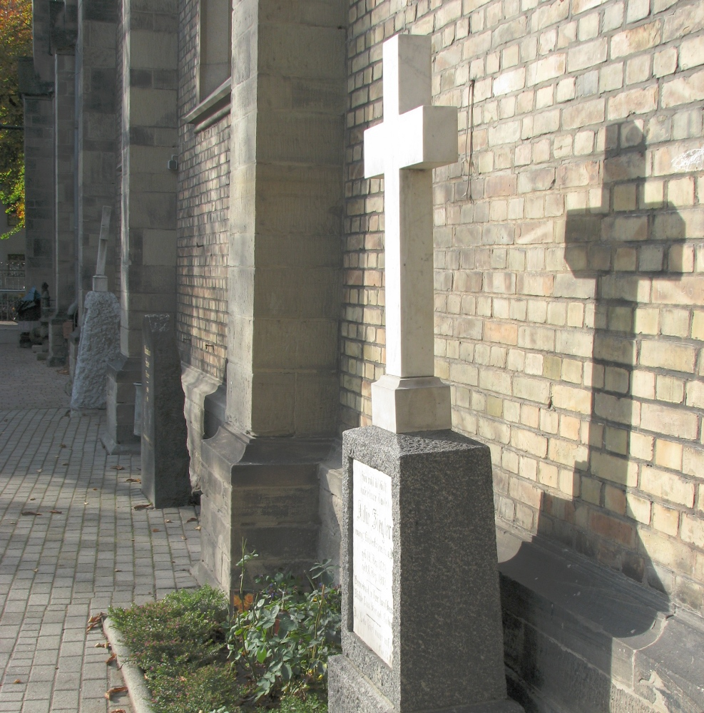 Matthäuskirche in Mannheim